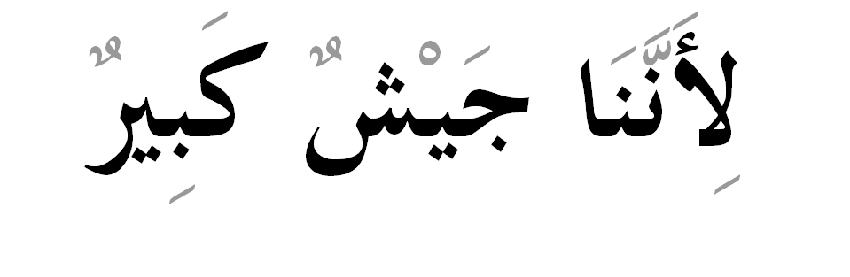 Հարաքա մասնիկների օրինակ